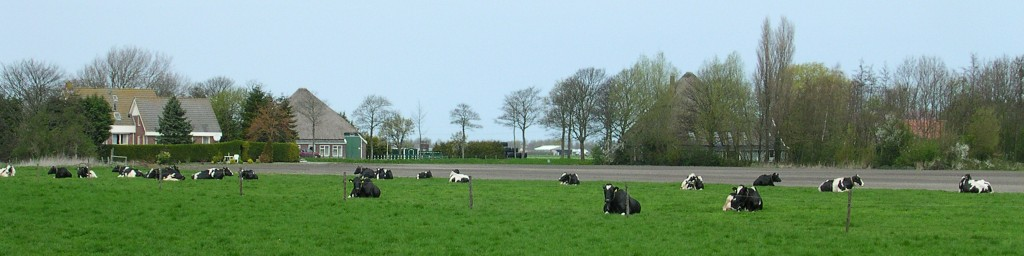 Uitzicht op koeien in de wei en in achtergrond stolpboerderijen in Oudijk. View of cows in the field and farms in the background, in the hamlet Oudijk.